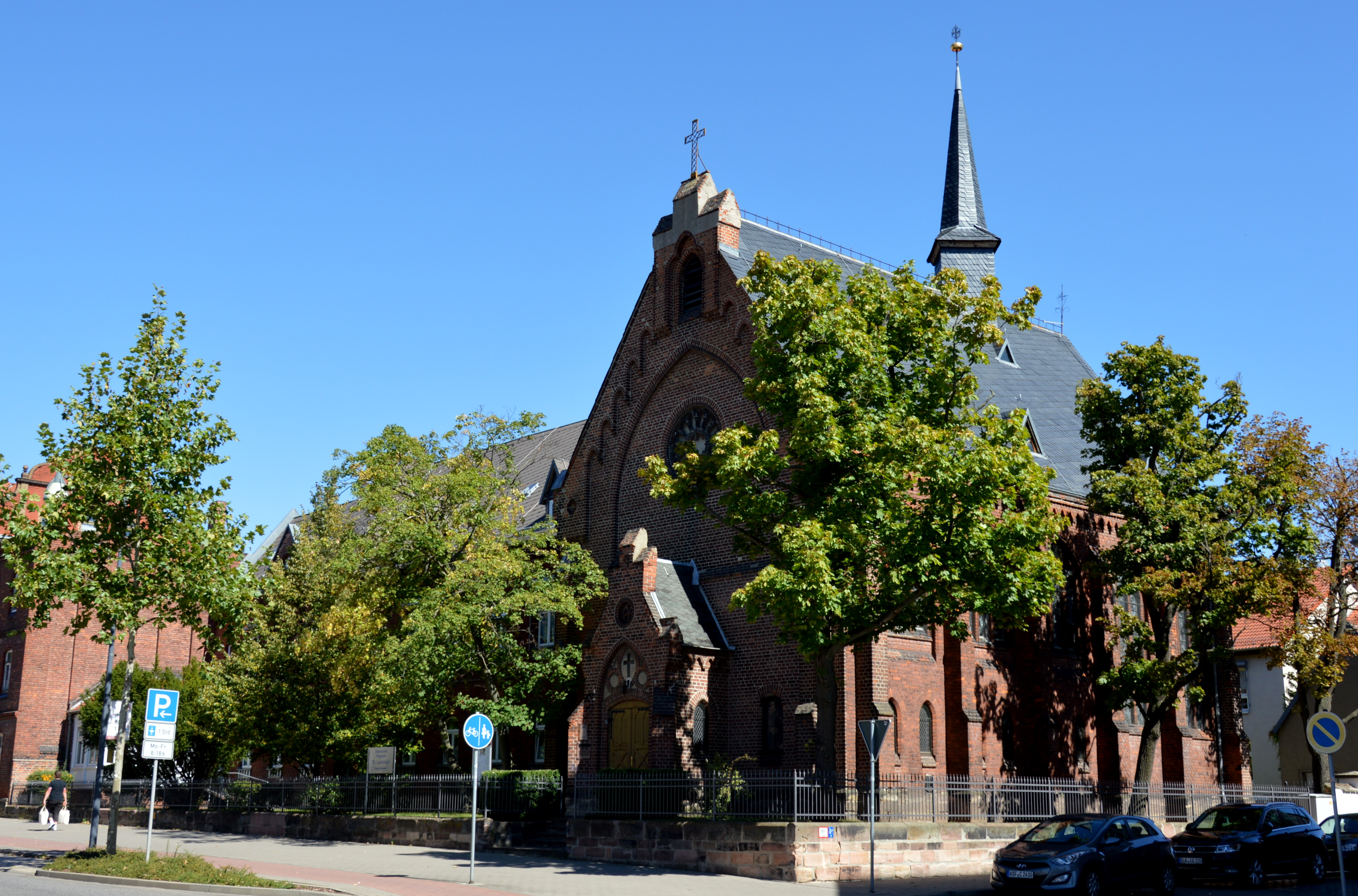 Merseburger Straße 19 in Weißenfels